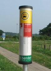 I bus haltepaal